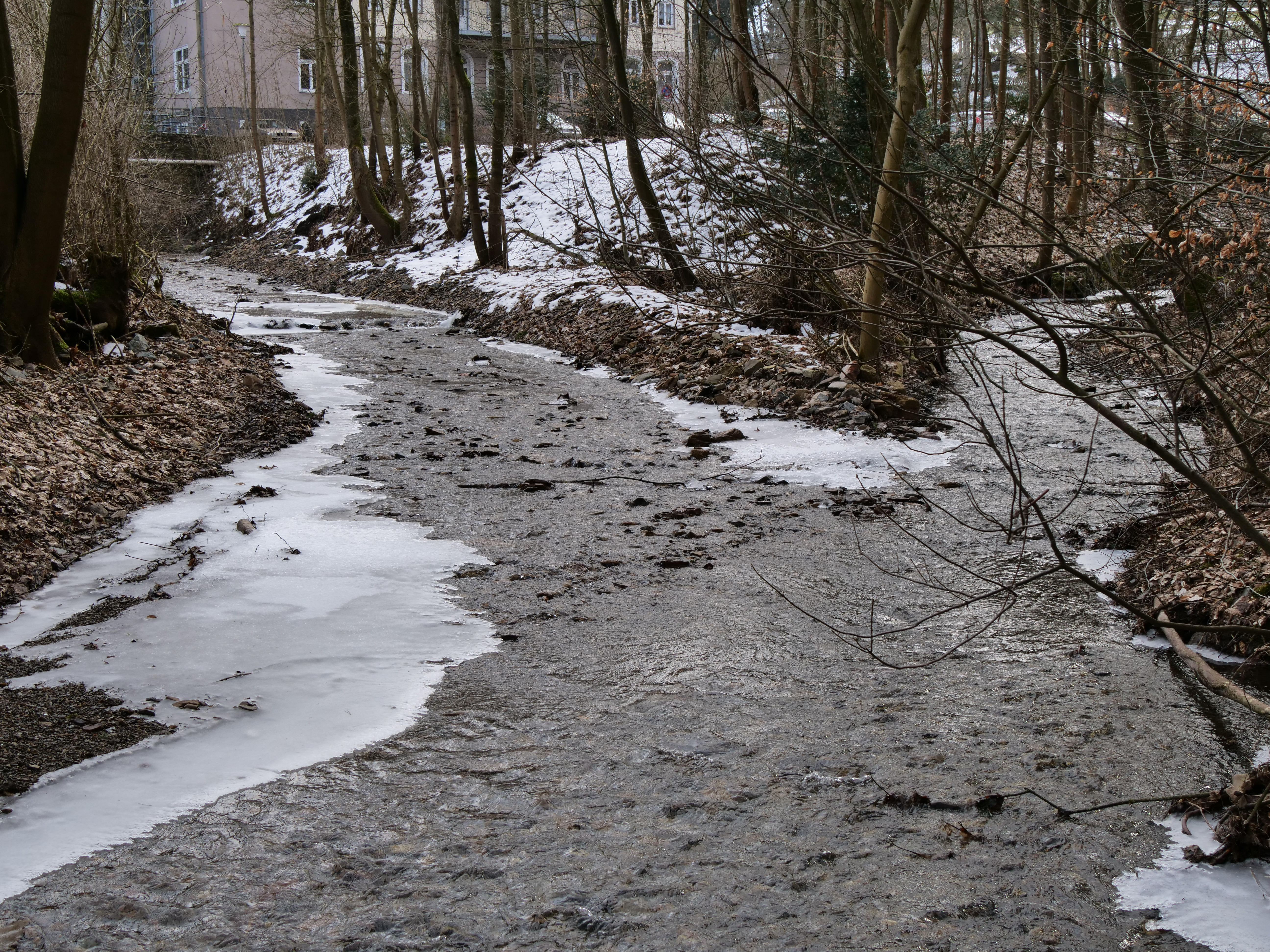 Einmündung der Gose (rechts) in die Abzucht am Ortseingang von Goslar nahe der B 241.